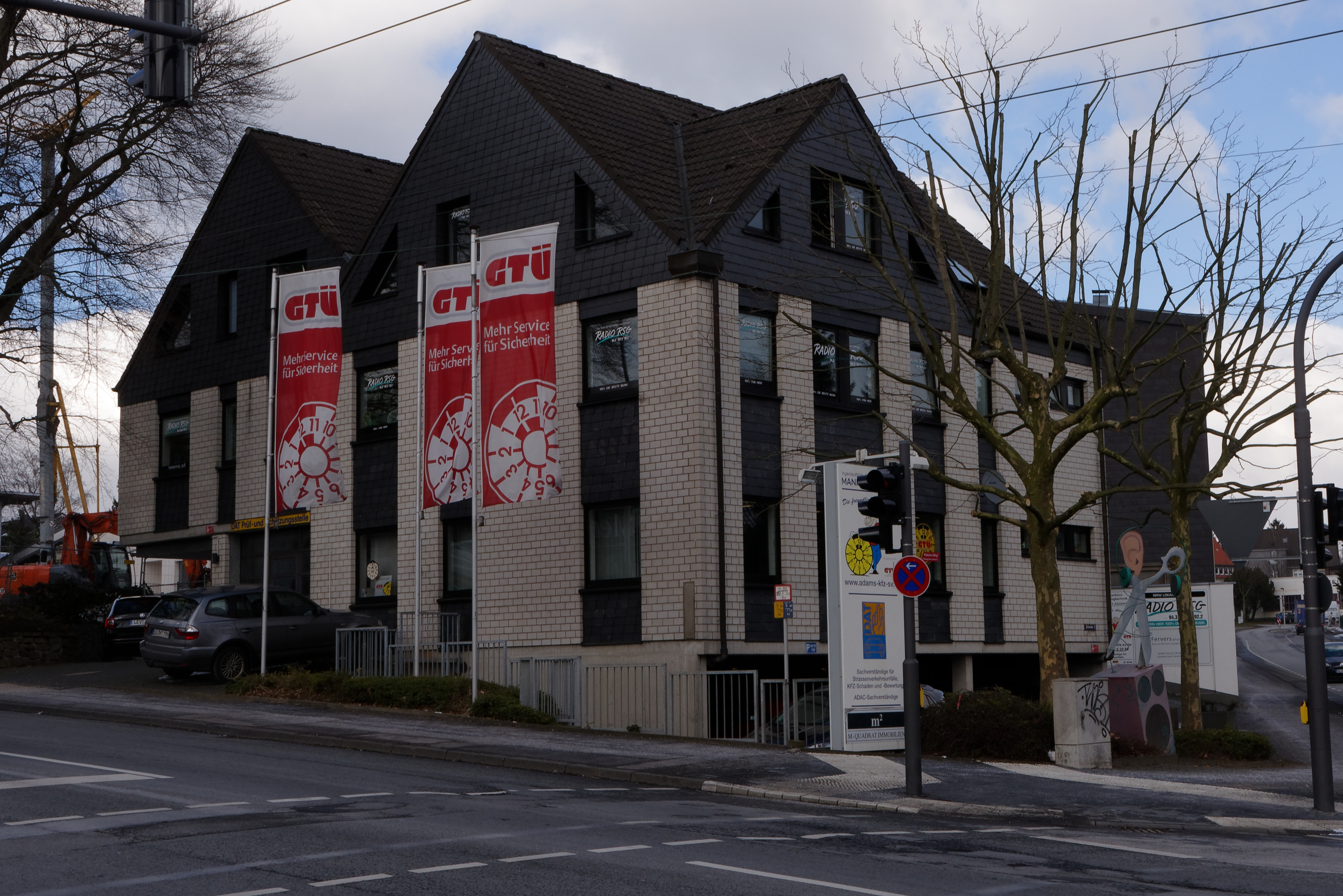 Hier ist RADIO RSG beheimatet